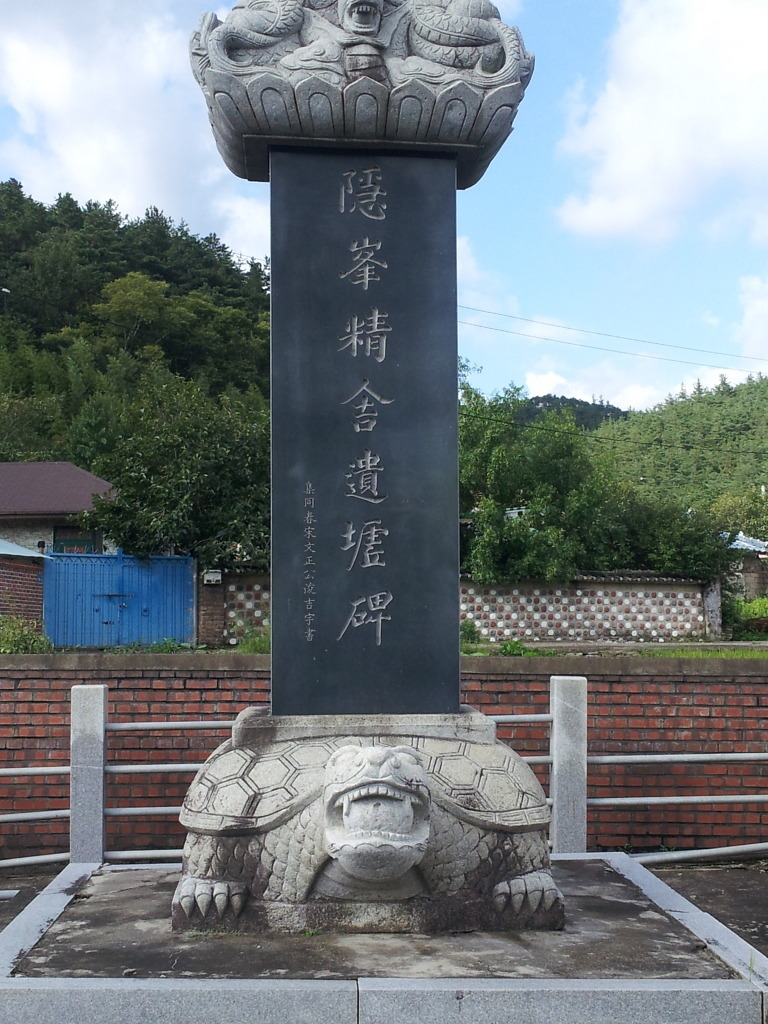 전남 화순군 이양면 매정리에 건립된 이 정사는 은봉이 만년에 강학했던 곳이요, 또 1654년 11월 13일 아침에 82세를 일기로 운명했던 유서 깊은 곳이다. ‘은봉(隱峯)’이라는 명칭은 선생이 포은(圃隱) 정몽주(鄭夢周)와 중봉(重峯) 조헌(趙憲)의 충효와 절의를 지극히 사모하여, 그 분들의 호에서 끝 자를 한 자씩 따서 편액으로 붙인 것이다. 은봉은 이 정사에서 서봉령(徐鳳翎)·양주남(梁柱南) 등 많은 제자들과 경전과 성리학을 강론했다. 이 정사가 언제 유허(遺墟)로 변했는지는 알 수 없다. 다만 1979년에 후손들과 유림들이 힘을 모아 세운 유허비(遺墟碑)가 은봉이 서식하고 강학하고 임종했던 모습을 되새겨 줄 뿐이다.